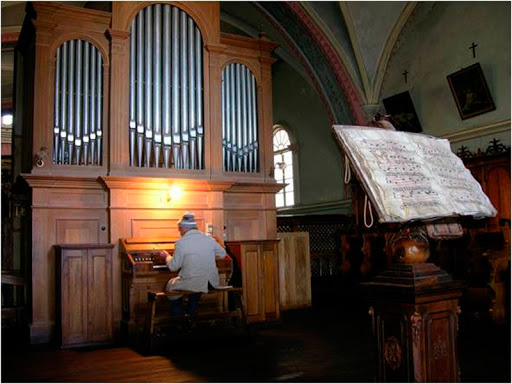 Majestuoso Organo